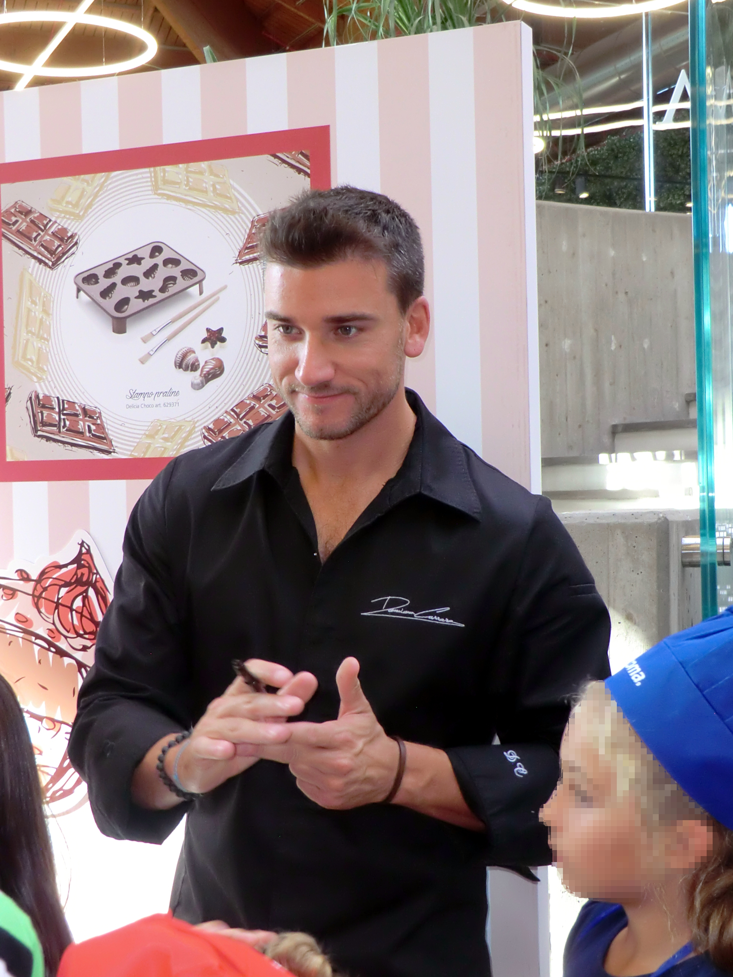 Damiano Carrara durante un evento tenutosi nel Parco AgroAlimentare FICO di Bologna.